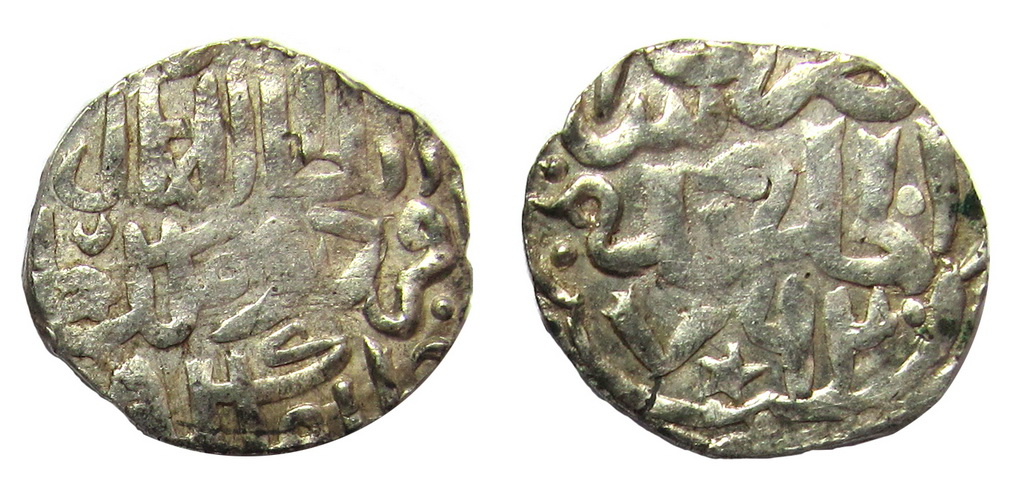 Данг Ордумелика. Чекан города Сарай ал-Джадид 762 г.х. Найден в 2010 году составе большого клада на территории Воронежской области